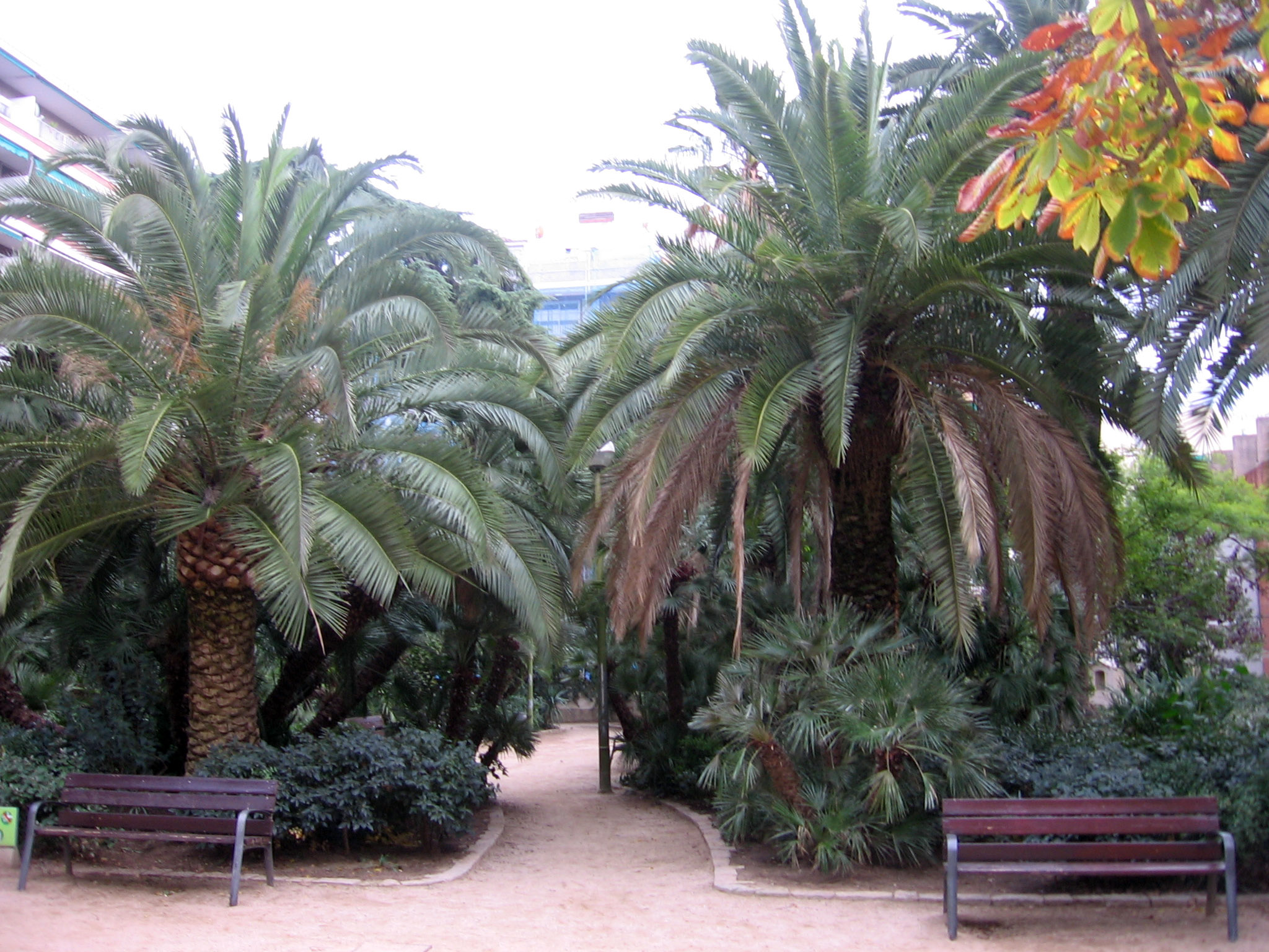 Jardines de Moragas.